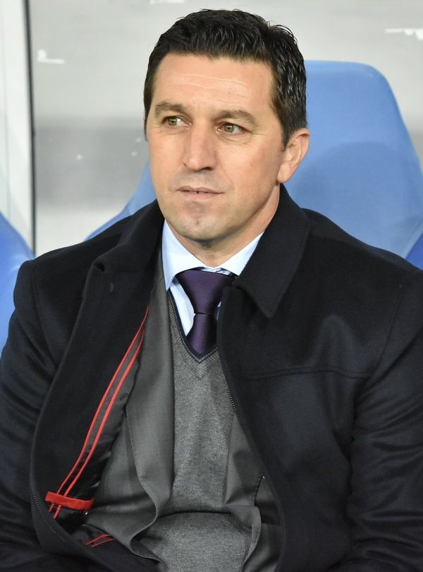 Беснік Хасі - футбольний тренер Андерлехта